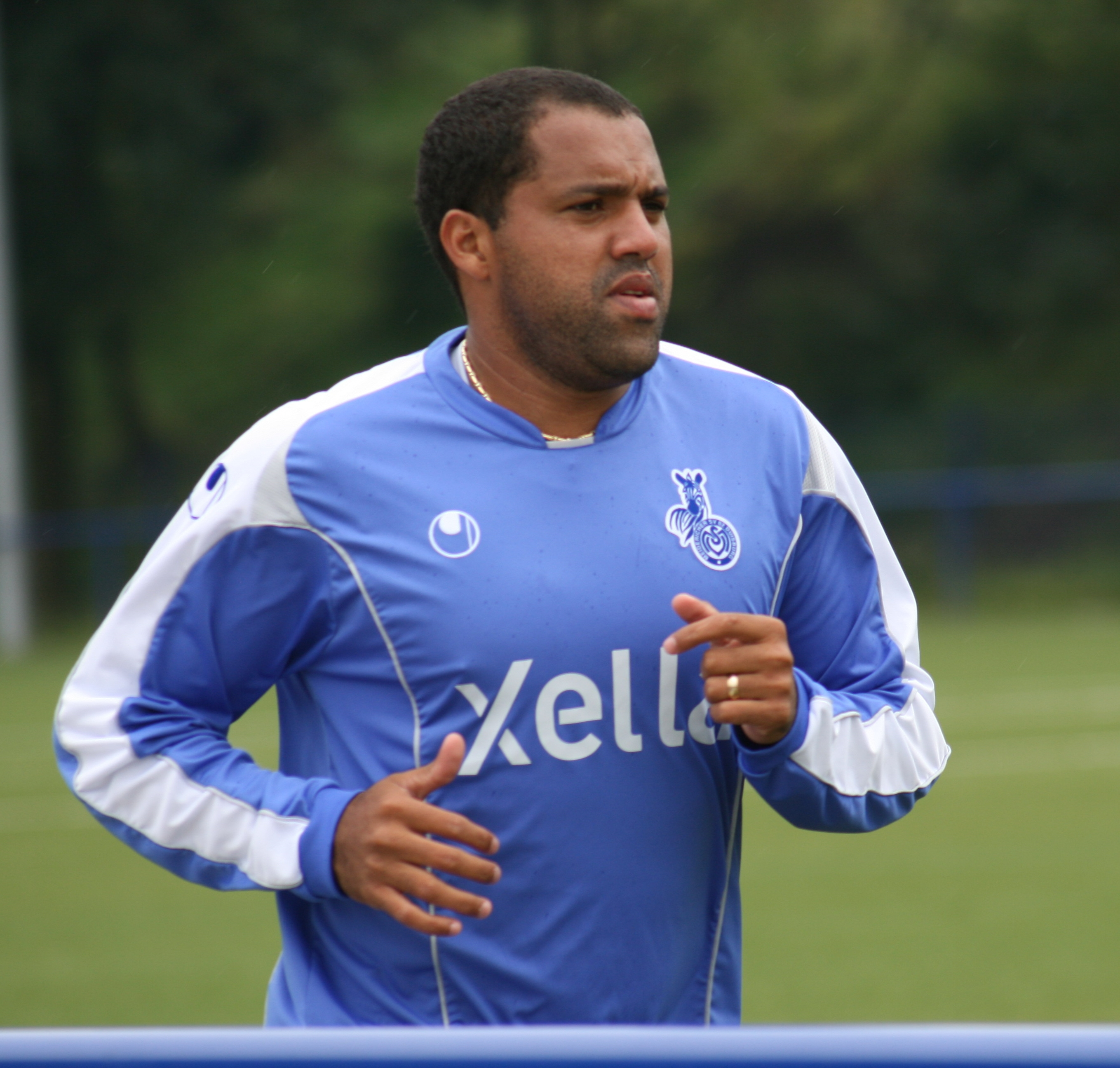 Aílton im MSV Duisburg Trikot beim Training